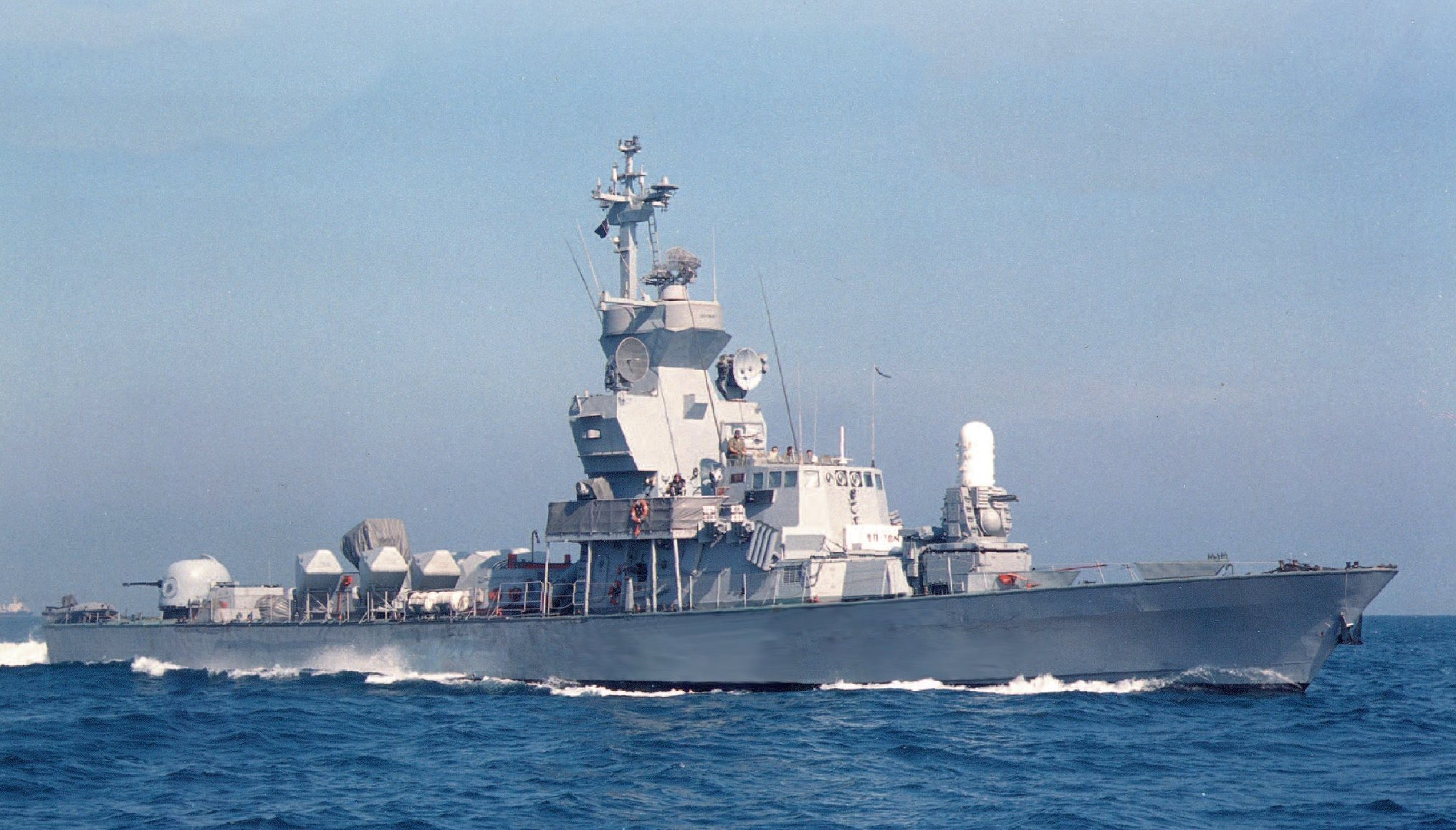 אח"י חץ ספינה מדגם סער 4.5 נירית